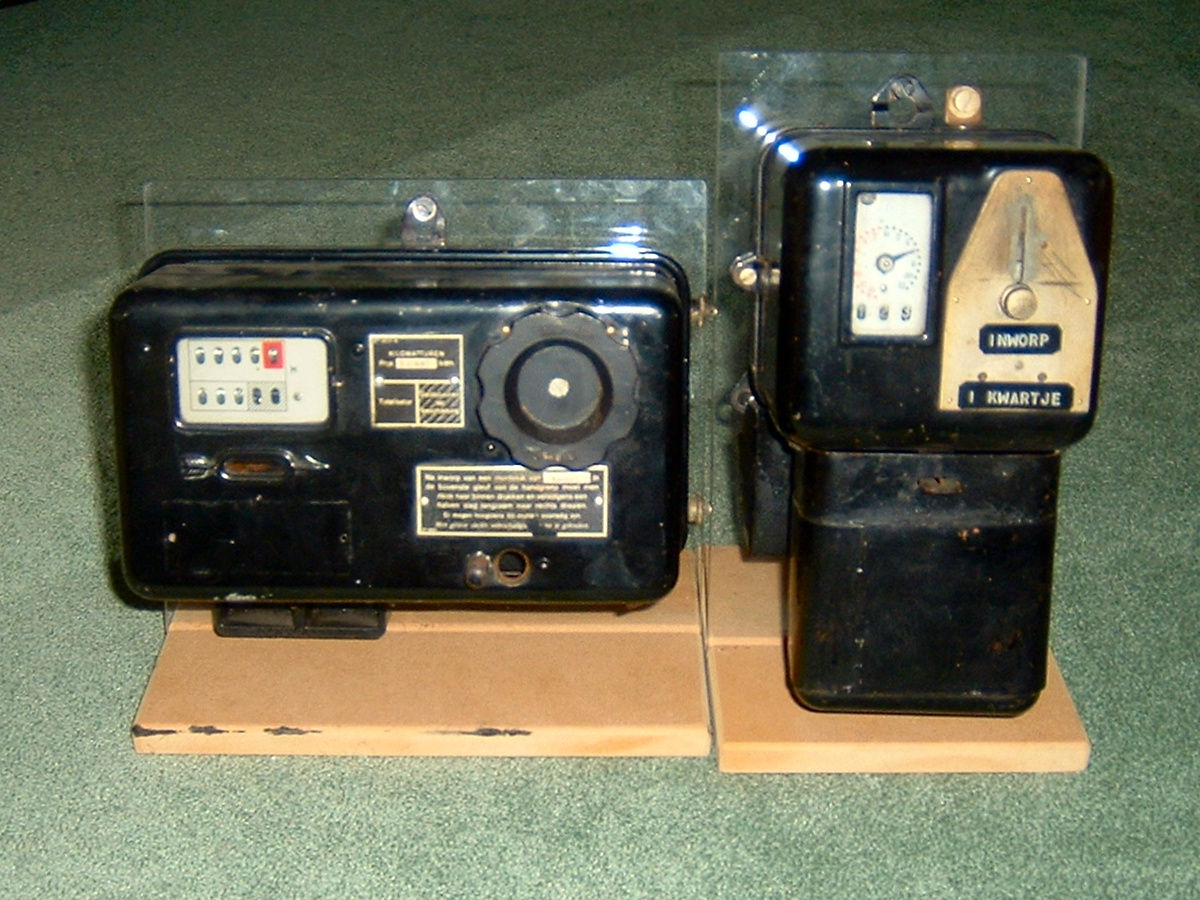 muntmeters: 1 op penningen, 1 op kwartjes